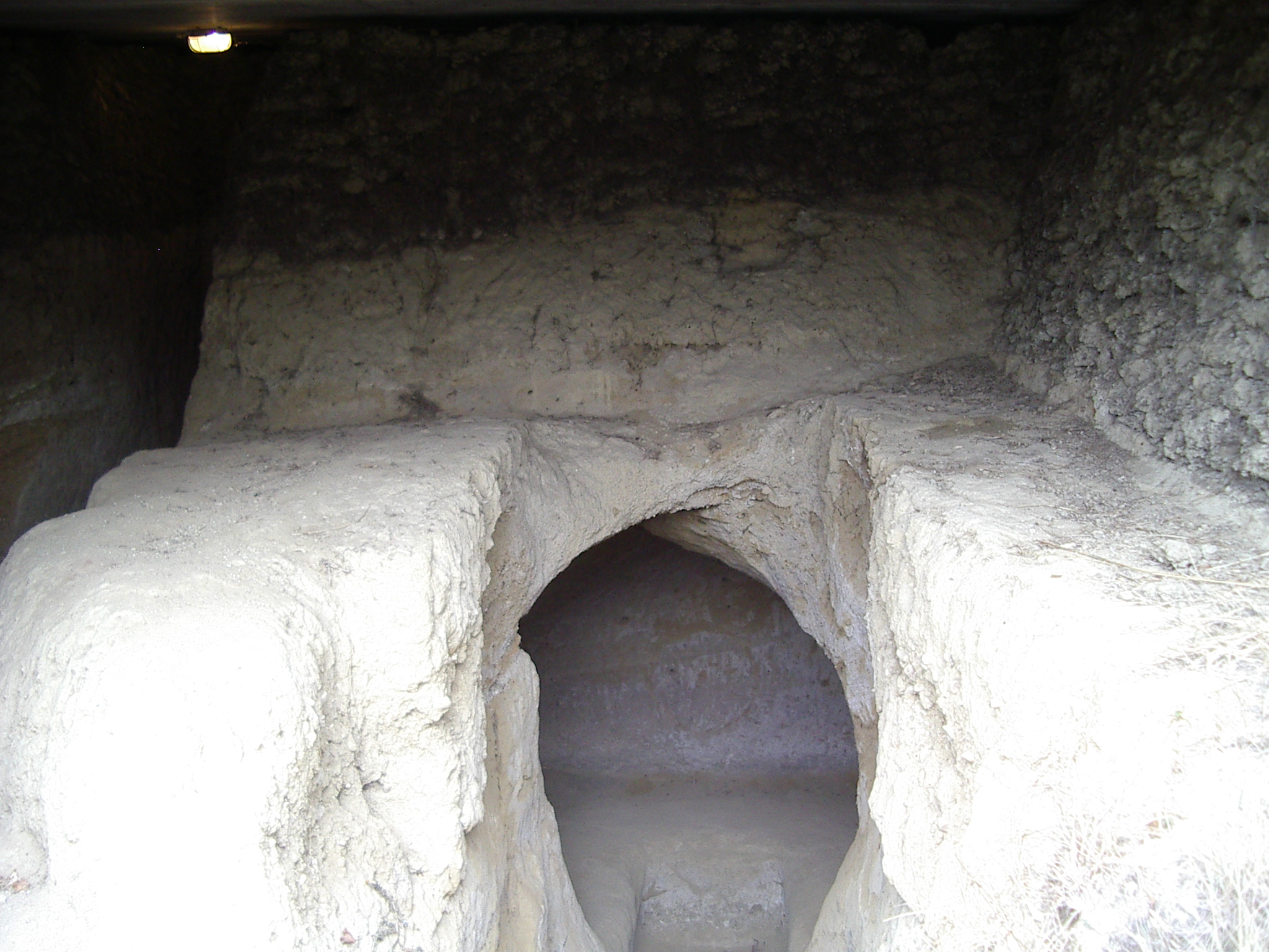 Nécropole du Palazzone, Pérouse , dromos d'une tombe étrusque